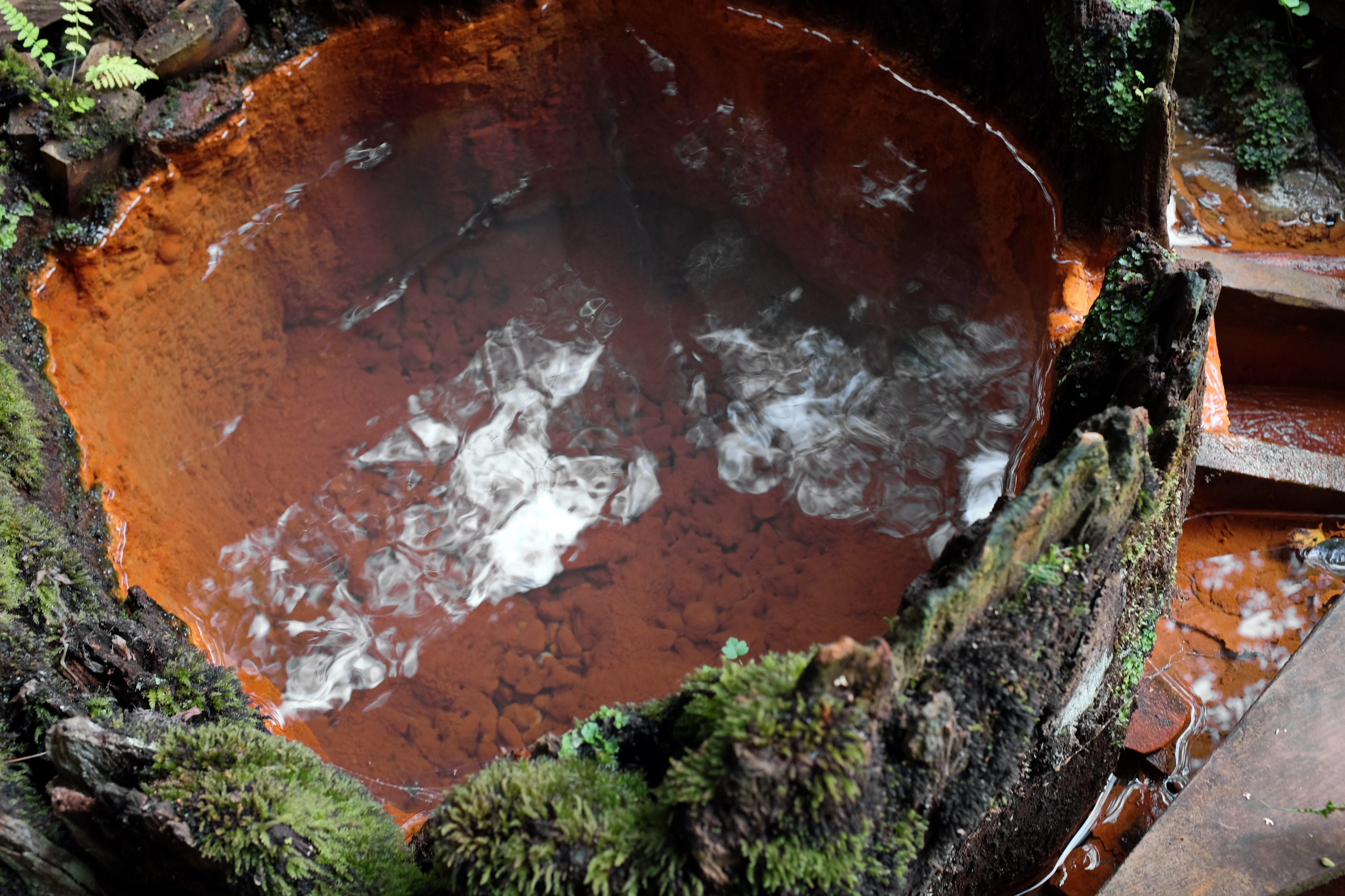 Panská kyselka, při Panském potoce u obce Drmoul, okres Sokolov